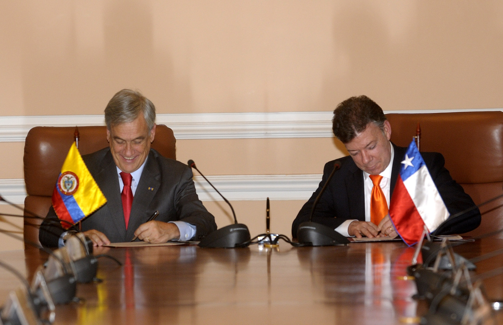 Suscripción de comunidado conjunto y documentos de trabajo de los Presidentes de Chile y Colombia.